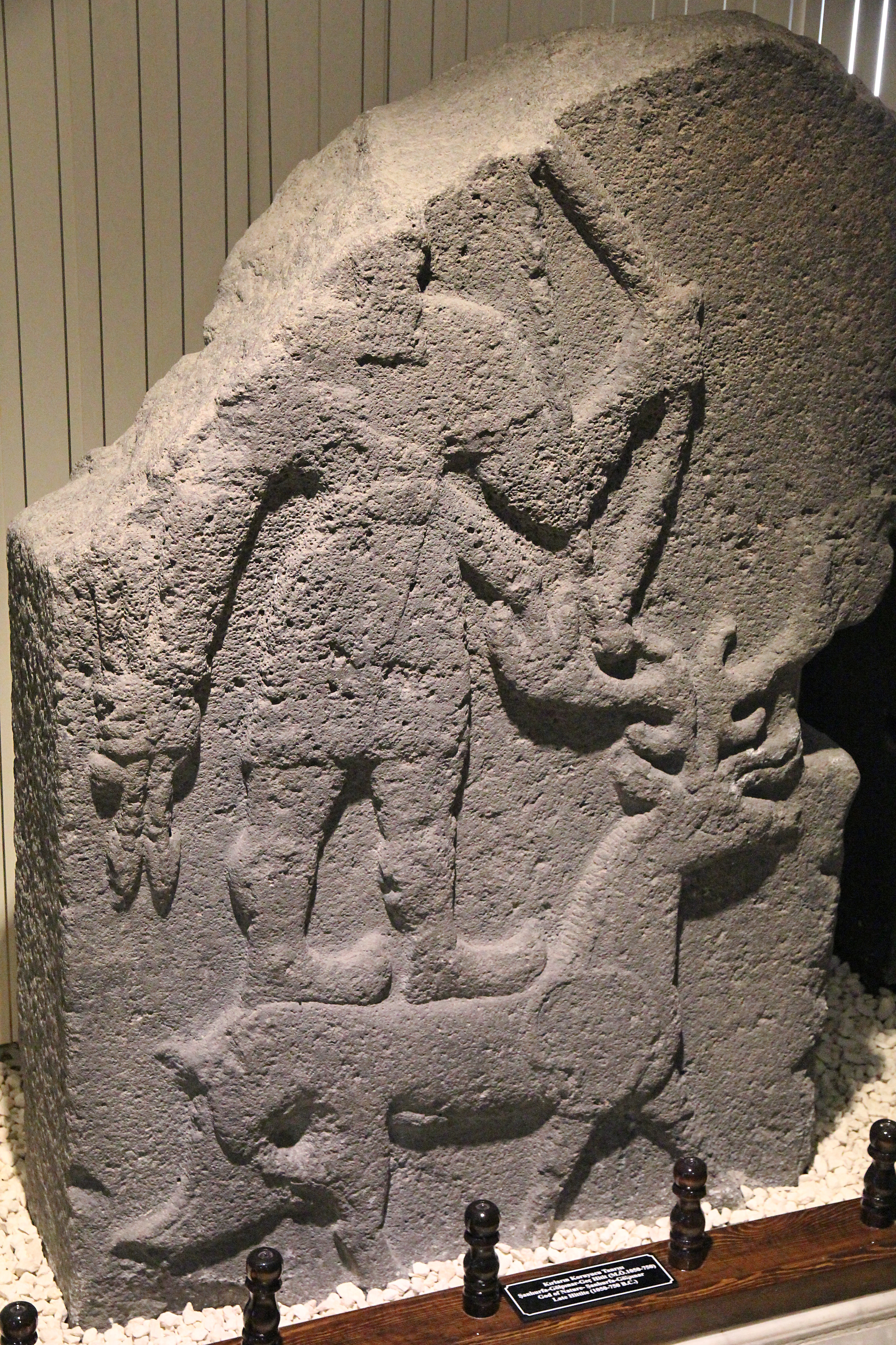 Archäologisches Museum Şanlıurfa, Südosttürkei, Relief eines hethitischen Naturgottes aus Gölpınar